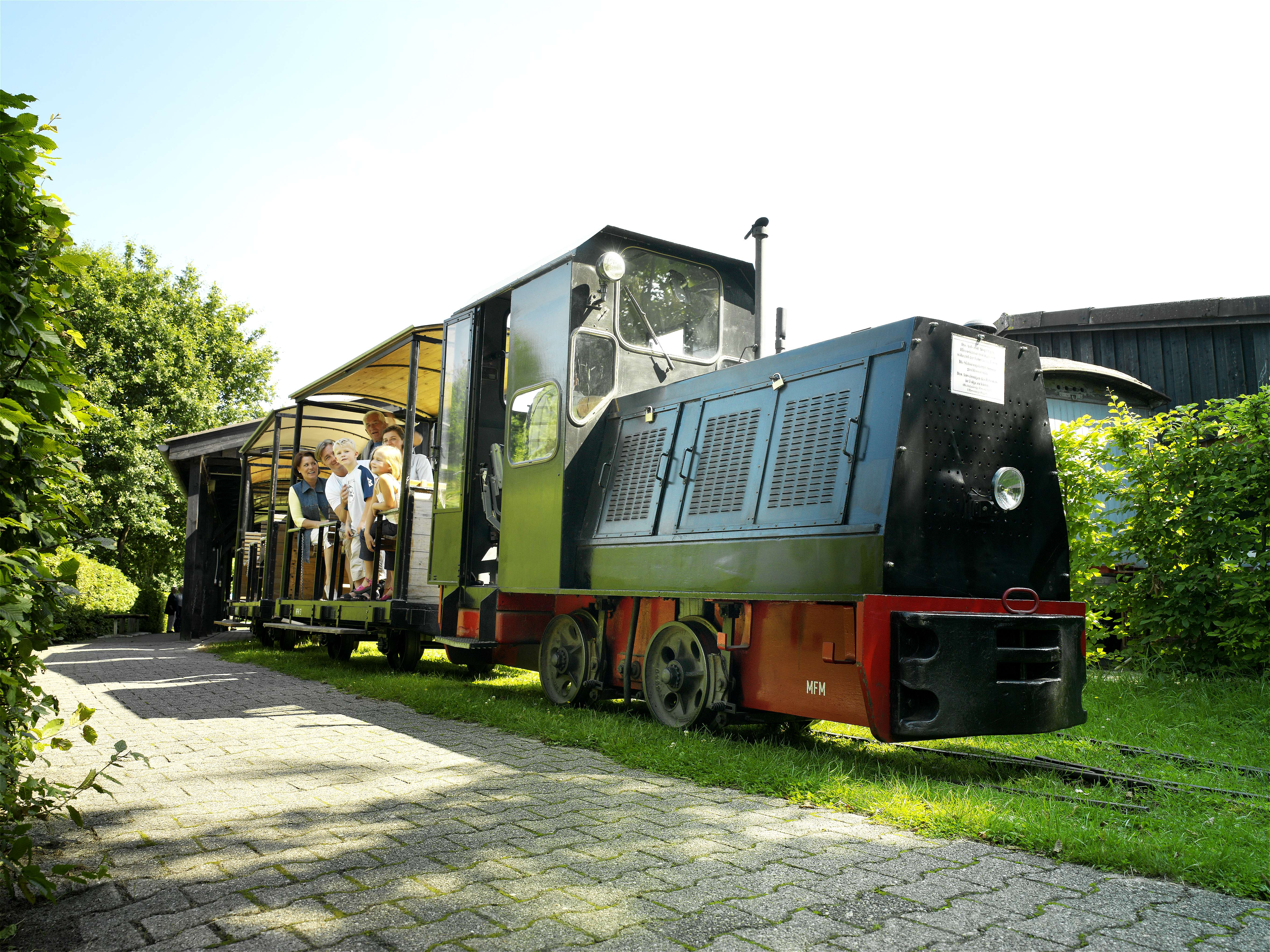 Schmalspurbahn im Emsland Moormuseum